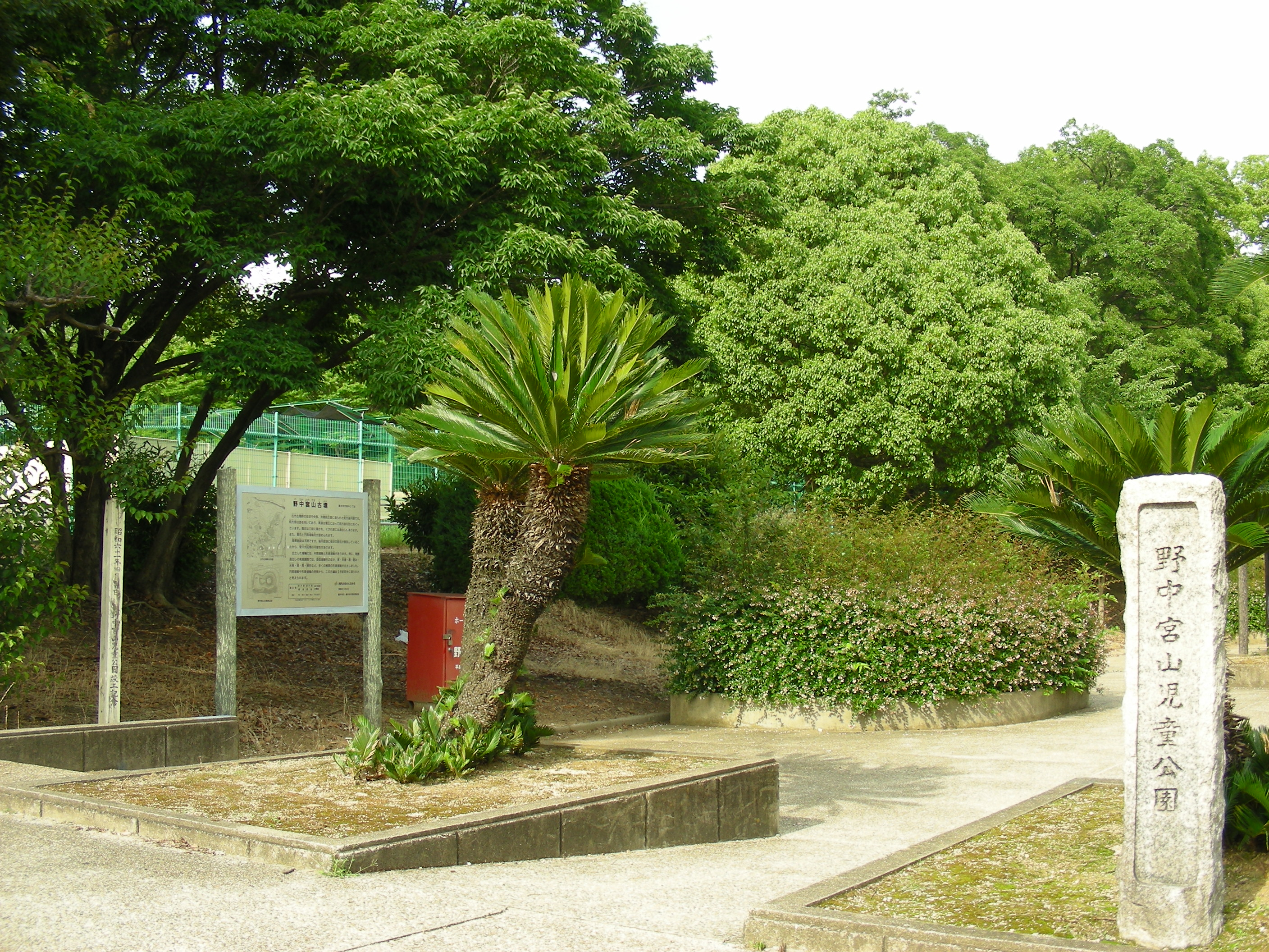 野中宮山古墳及び野中宮山児童公園